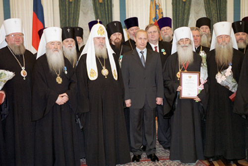 МОСКВА, КРЕМЛЬ. Церемония вручения государственных наград священнослужителям Русской православной церкви и других христианских конфессий.